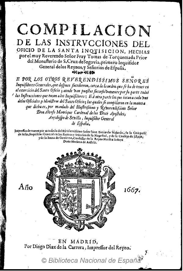 Compilación de las instrucciones del oficio de la Santa Inquisición hechas por dicho Torquemada Autor: Torquemada, Tomás de (1420?-1498) Fecha: 1667 Datos de edición: Madrid. [s.n.]